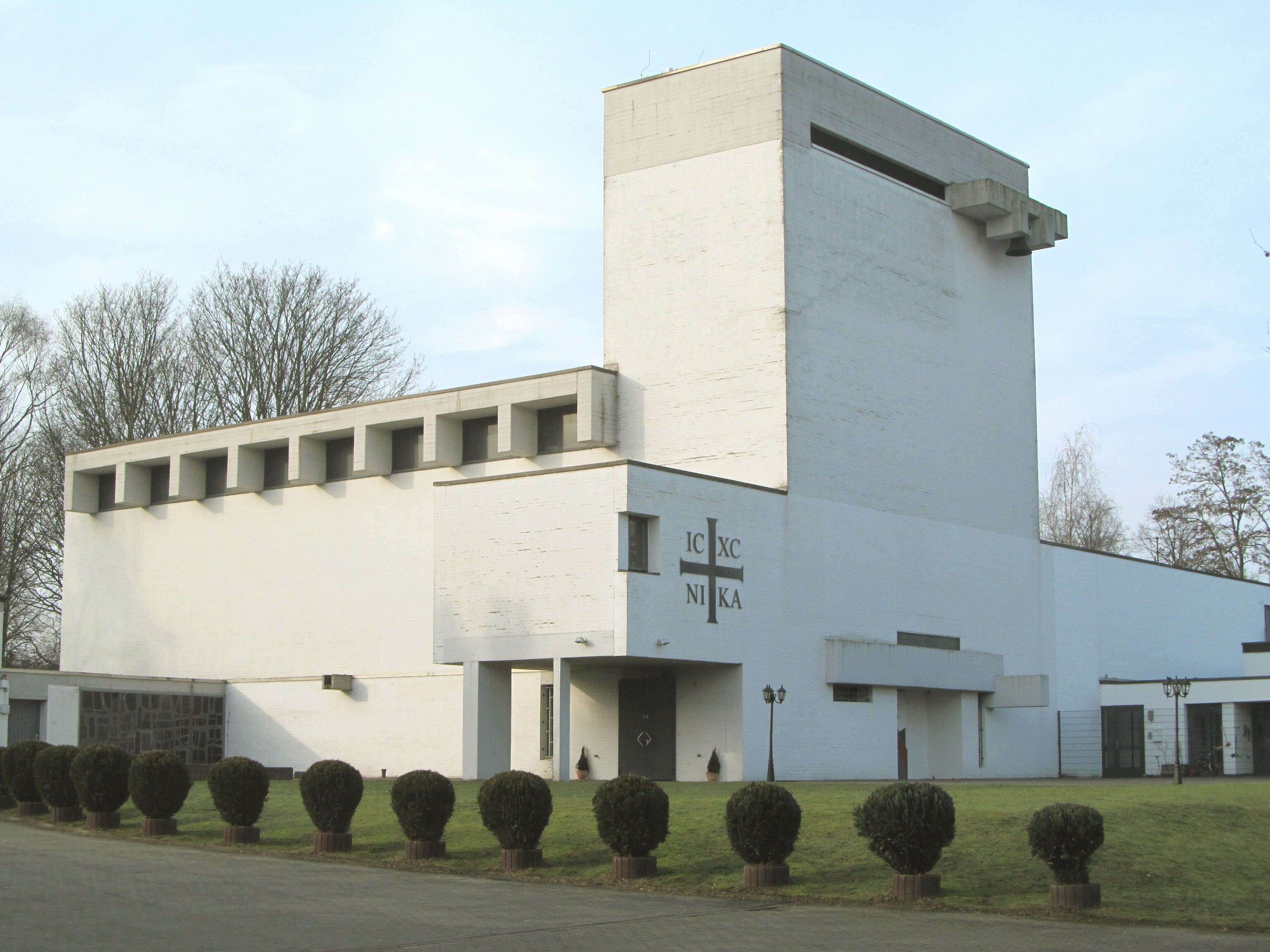 ehemalige Simeonkirche in Hamburg-Hamm, erbaut 1965/66 von Friedhelm Grundmann, Ansicht von Nordosten This is a photograph of an architectural monument.